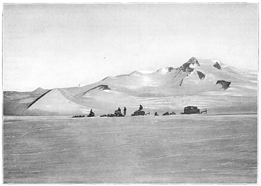 Aan de Zuidpool